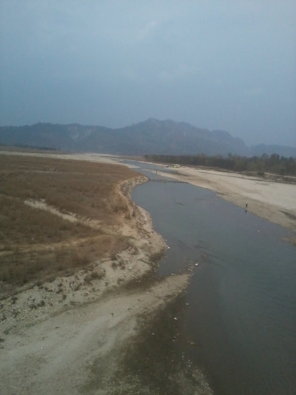 कन्काई नदी